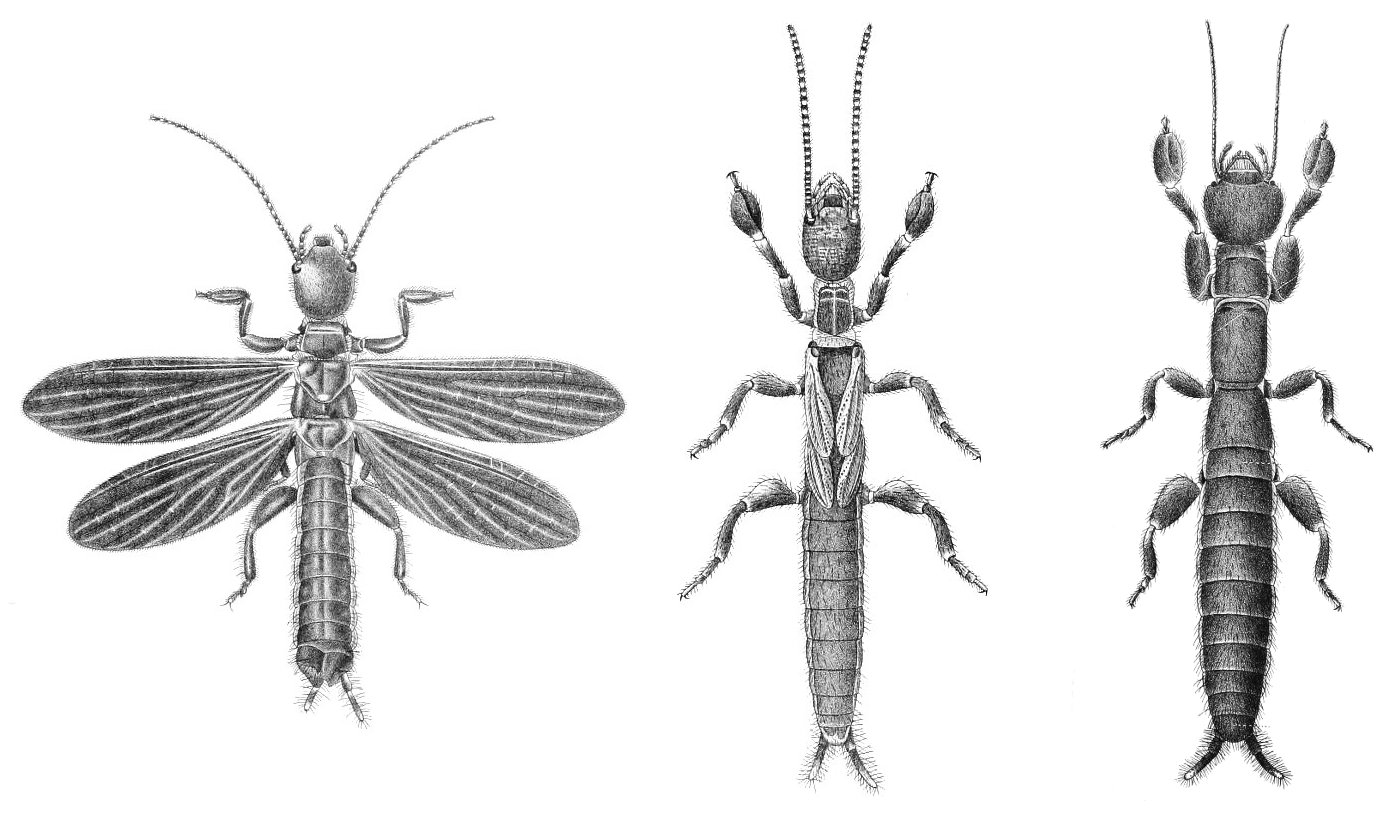 Embia major, Embioptera - adult male, male nymph and adult female